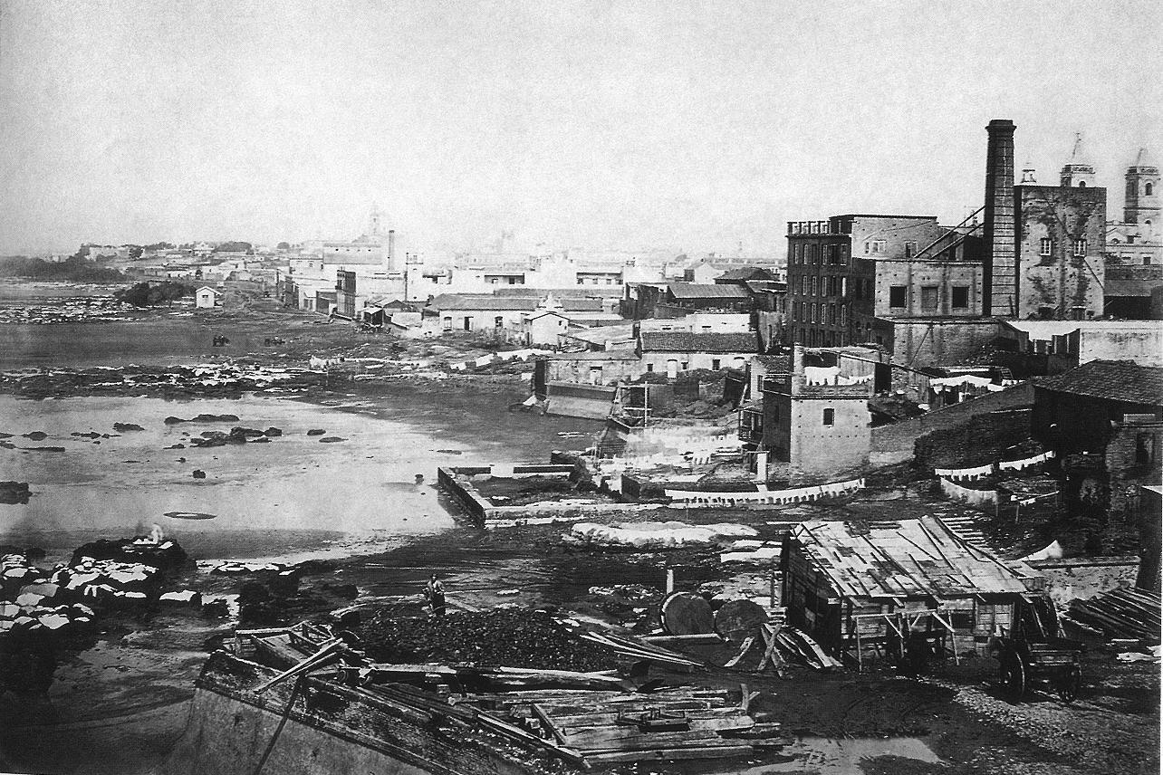 Vista de la Ribera del Río de la Plata desde la zona del Fuerte de Buenos Aires (donde hoy se encuentra la Casa de Gobierno) hacia los barrio de Monserrat y San Telmo. A la derecha resalta la chimenea del Molino San Francisco, una de las construcciones más altas y con más pisos de la ciudad. Al margen derecho, las dos cúpulas de la Iglesia de Santo Domingo. Hacia el fondo, se ve la Iglesia de Nuestra Señora de Belén. Con el río en un bajo nivel, se formaban ollas donde se lavaba la ropa, y se ven edificaciones precarias y materiales de construcción.